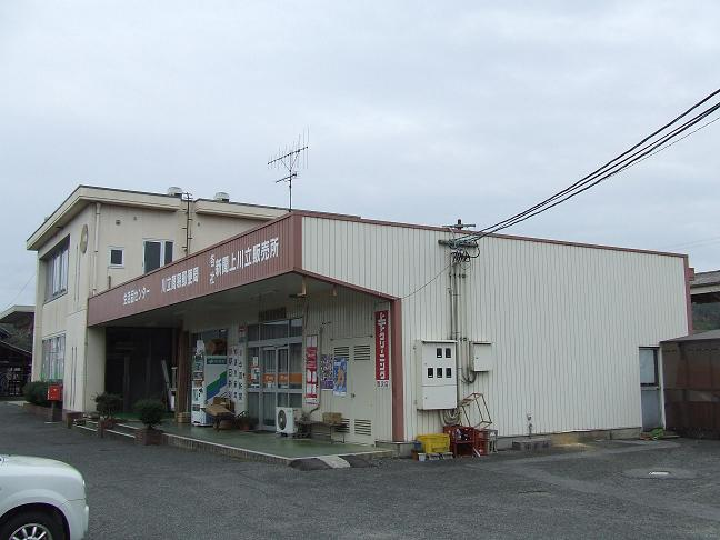 JR西日本芸備線上川立駅の駅舎